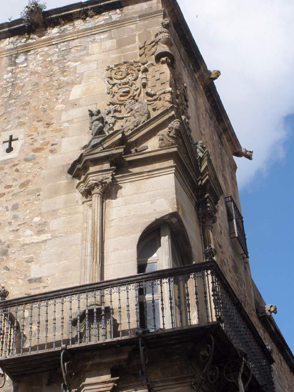 Palacio de Godoy (Cáceres)